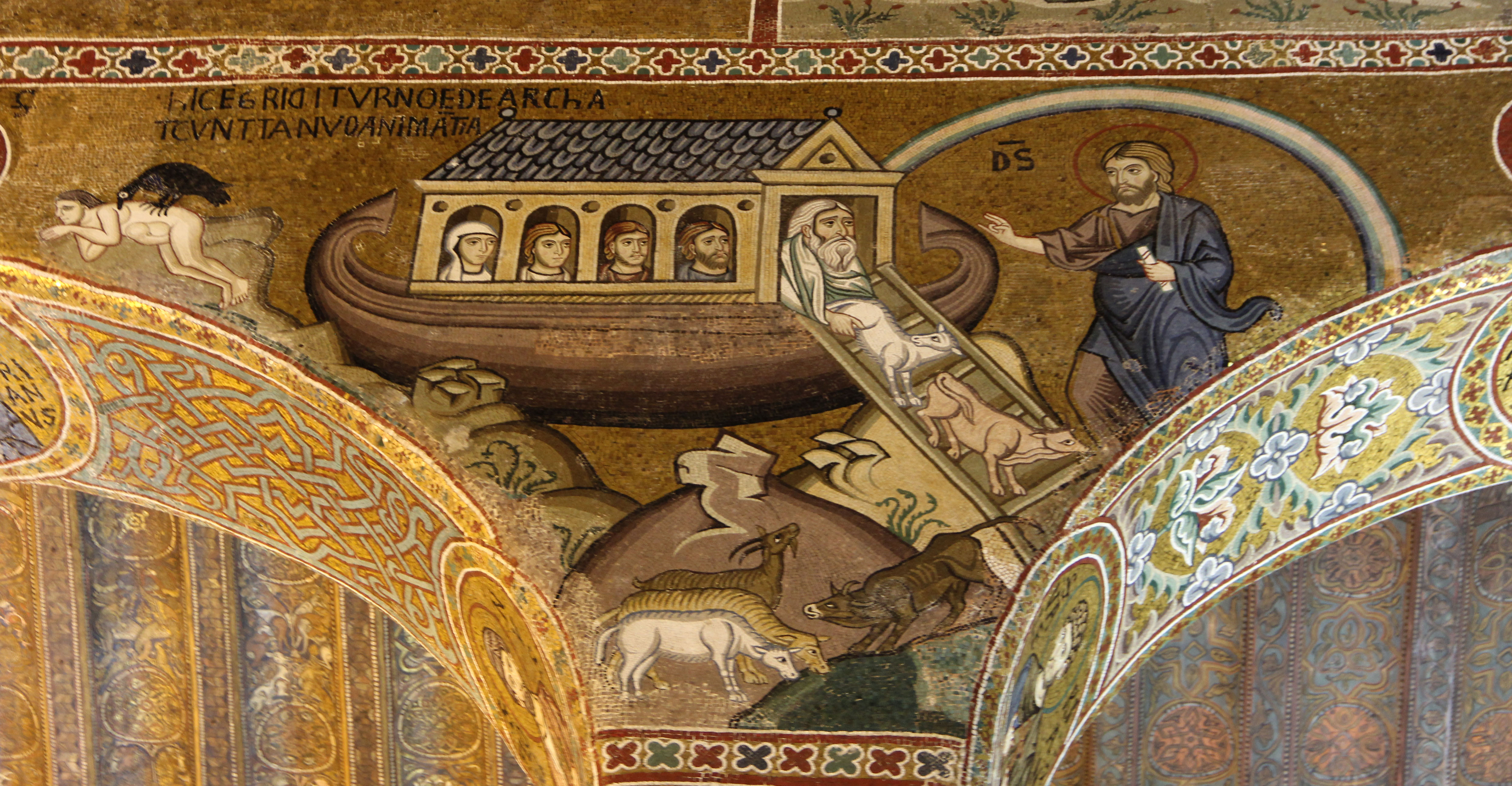 Chapelle palatine de Palerme (vers 1150)